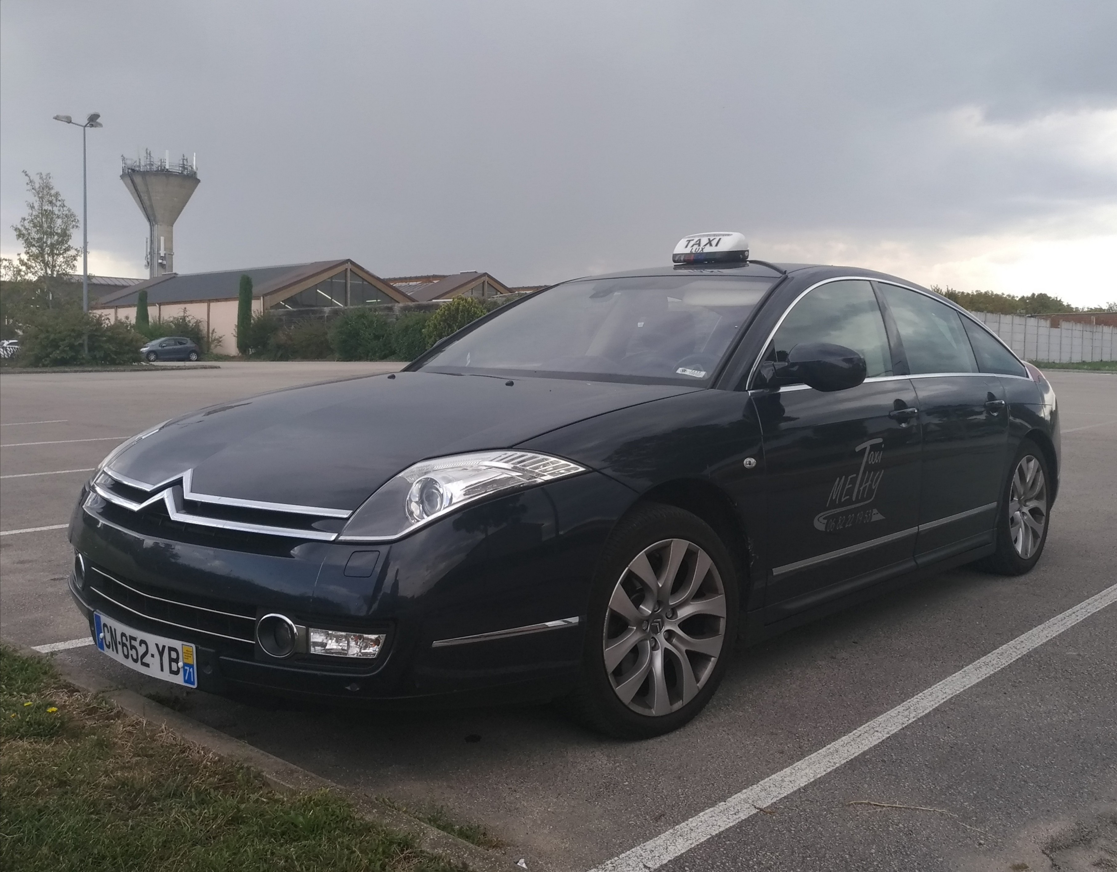 Citroen C6 Taxi